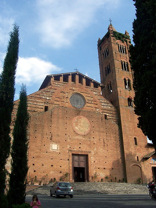 Siena - Basilica dei Servi